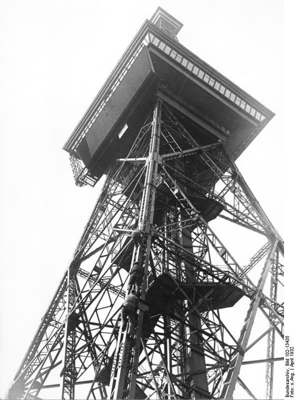 Berlins Wahrzeichen der grosse Funkturm wird frisch angestrichen! Die Malkolonne nimmt ihren Aufstieg an den Aussenträgern des grossen deutschen Funkturms.